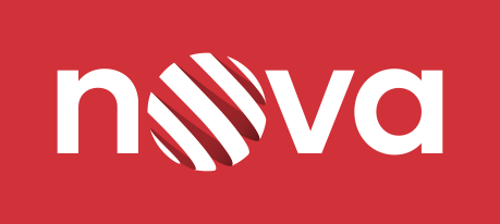 logo TV Nova